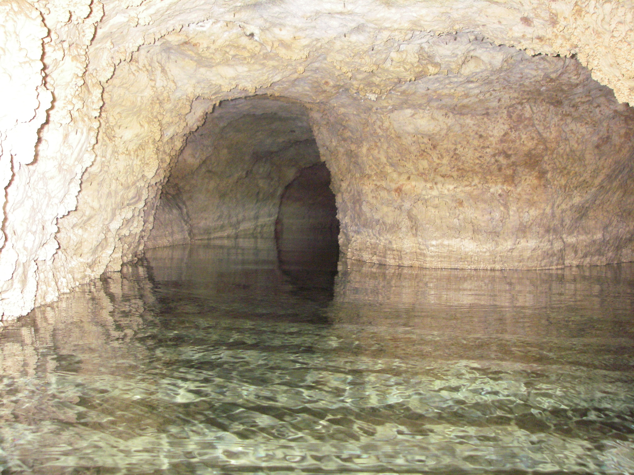 Silberloch im schweizerischen Jura, ehemaliges Bergwerk, teilweise versintert